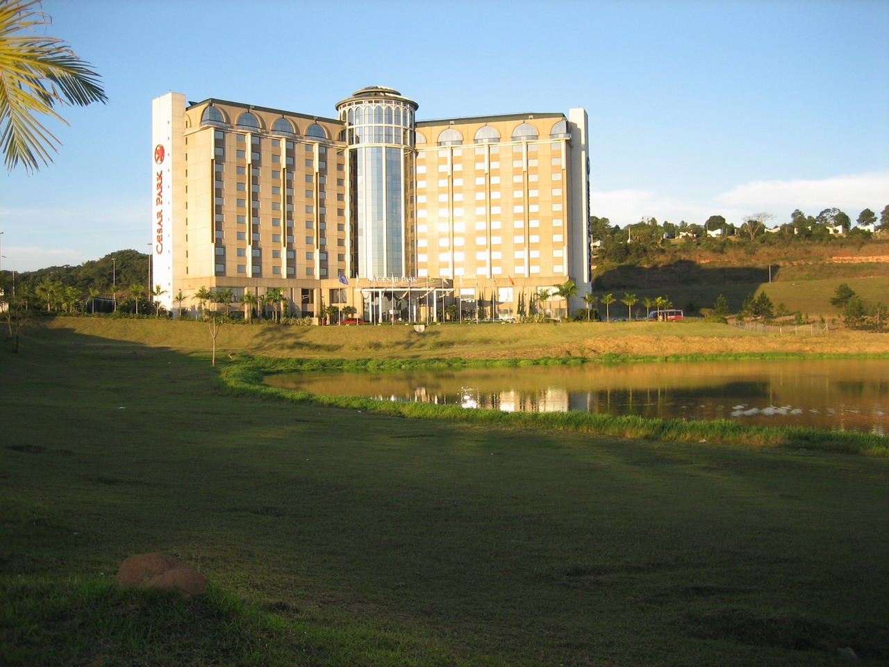 Caesar Park Hotel